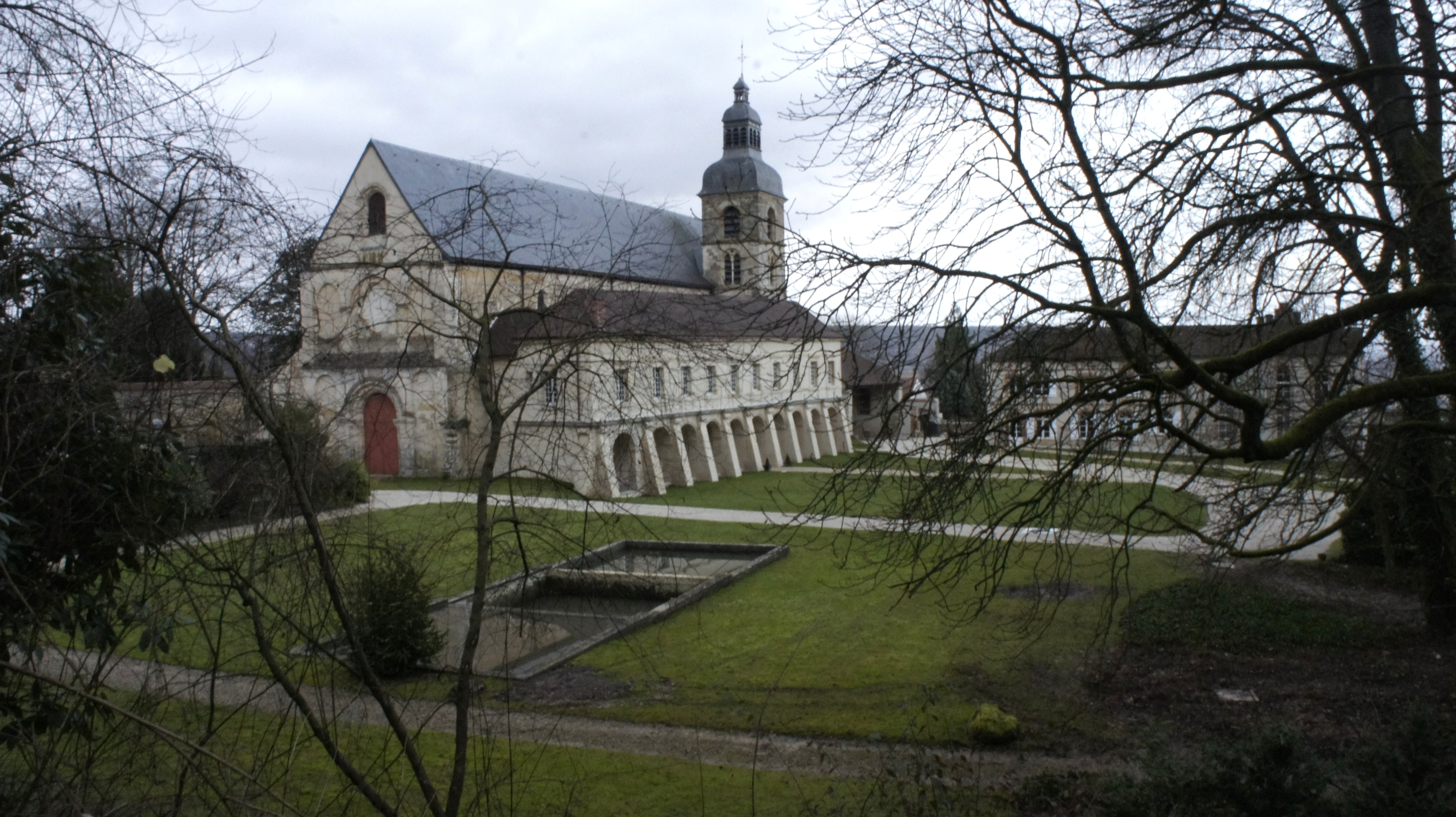 Monastère st-Pierre vue depuis l'est.